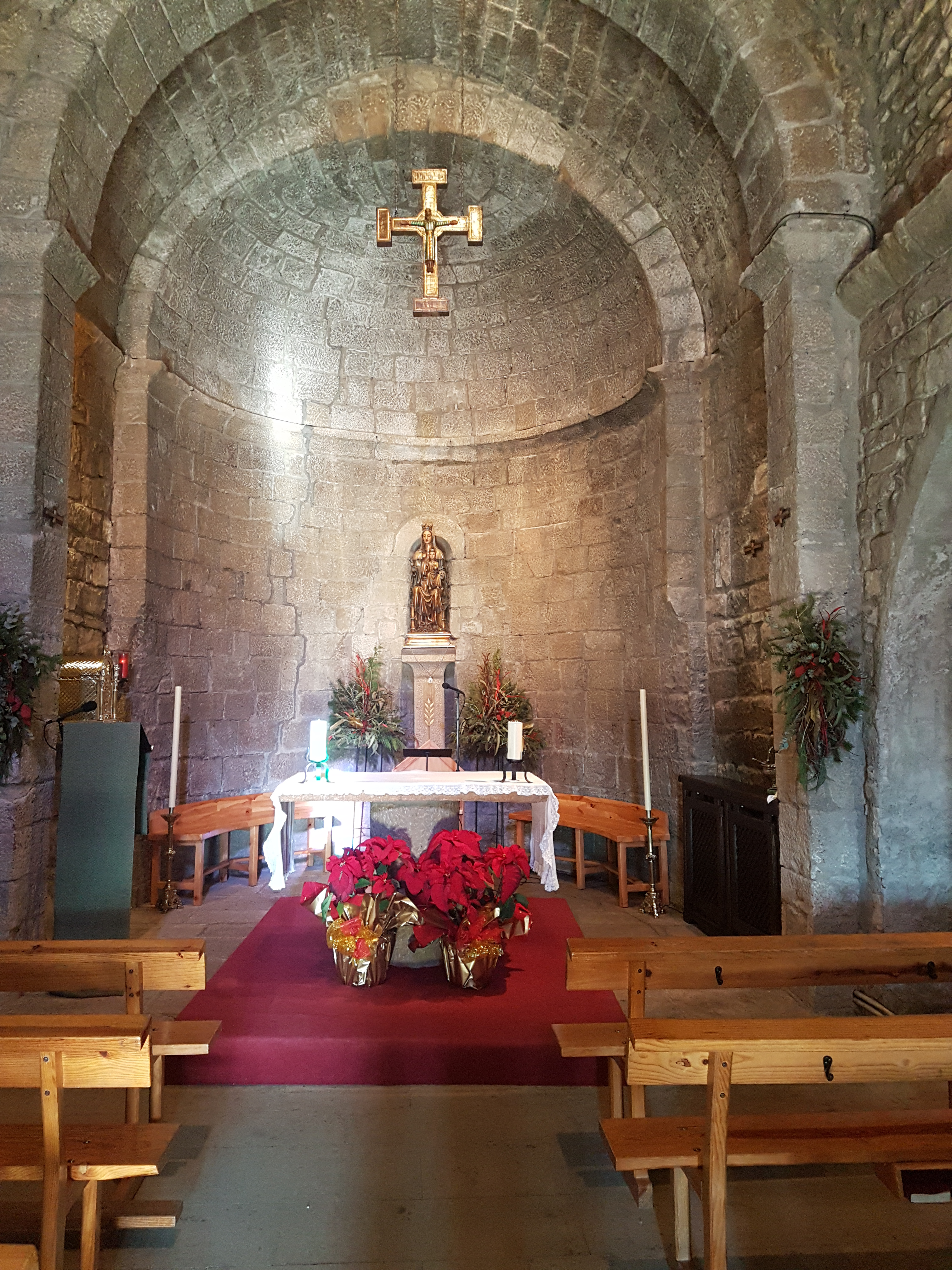 Església Santa Maria de Viladordis per dins